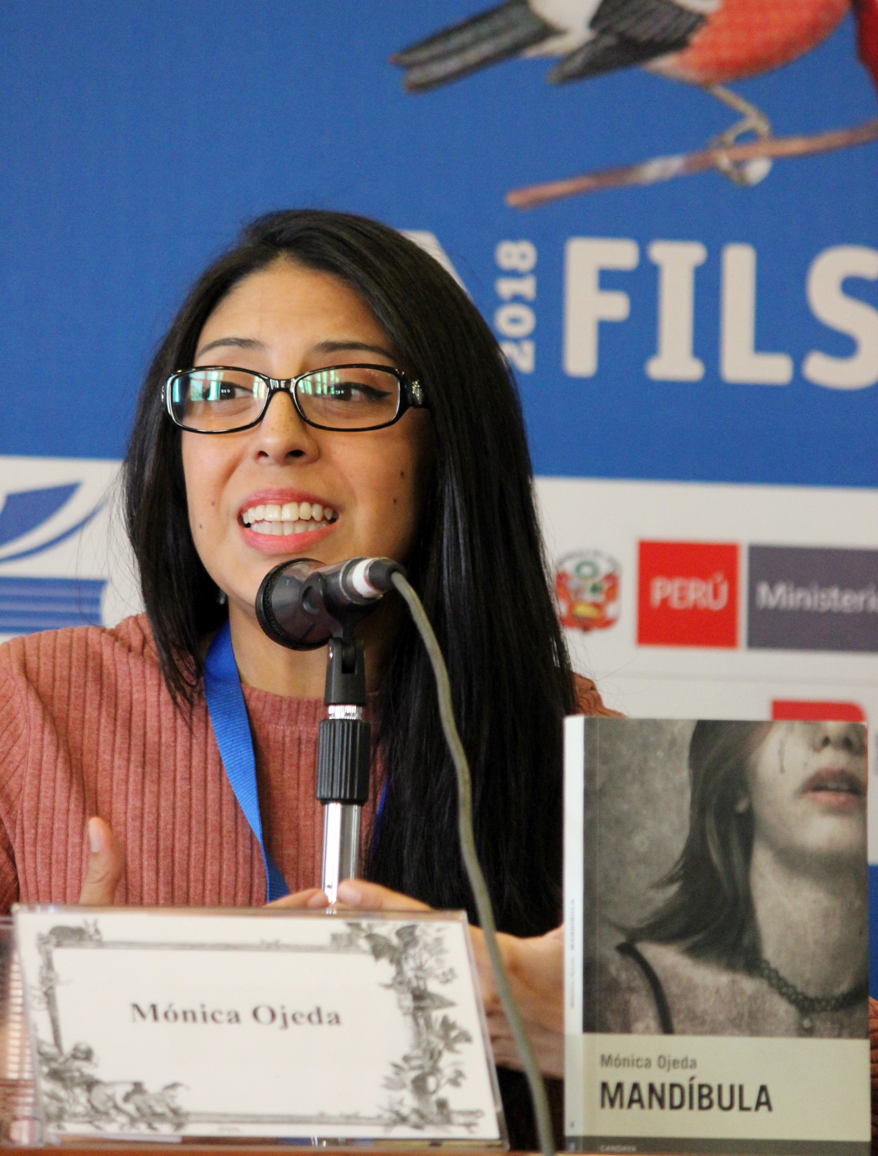 La escritora ecuatoriana Mónica Ojeda en la Feria Internacional del Libro de Santiago 2018.